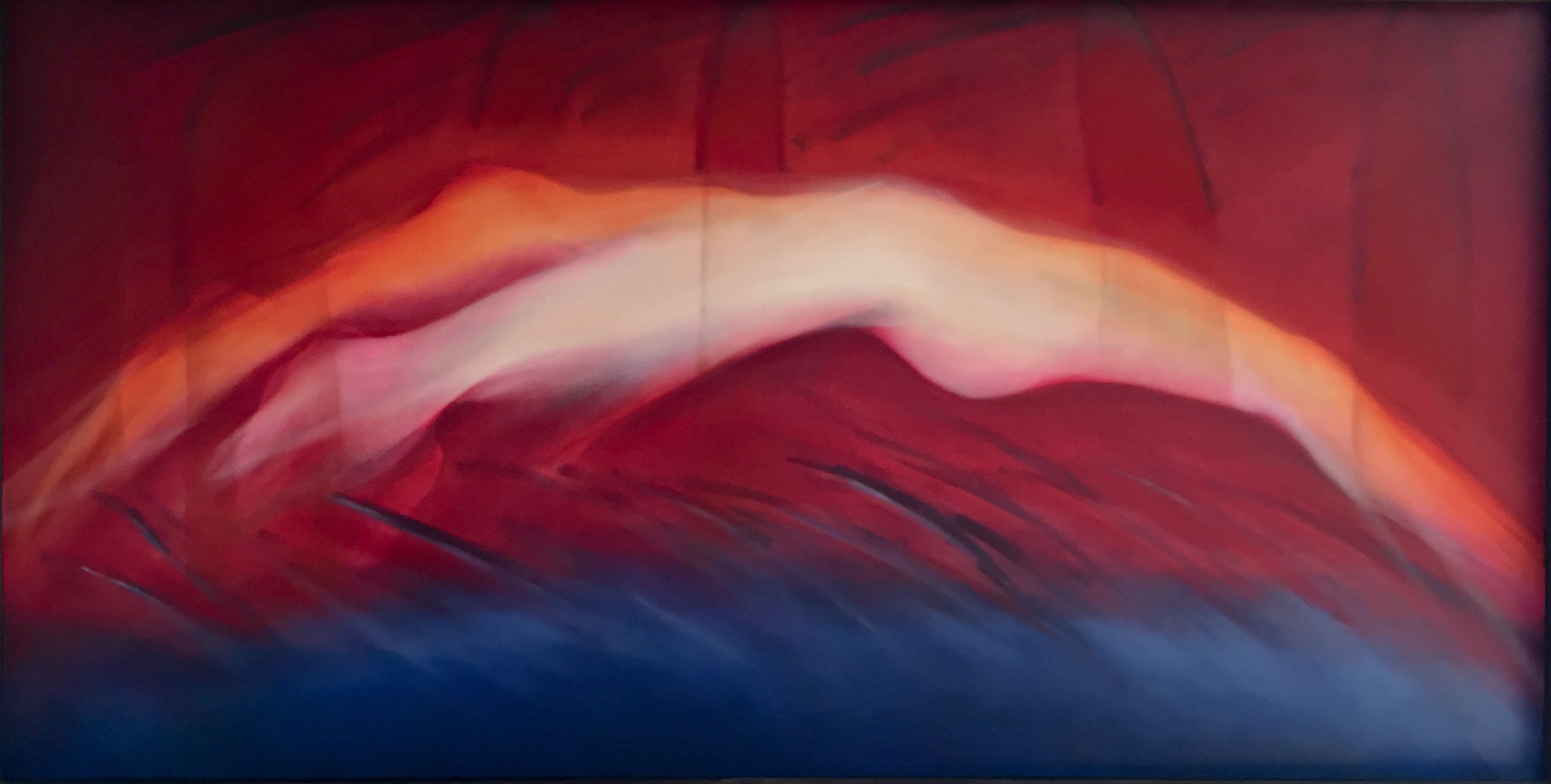 Zofia Glazer. ez tytułu. Fot. Krzysztof Rudziński